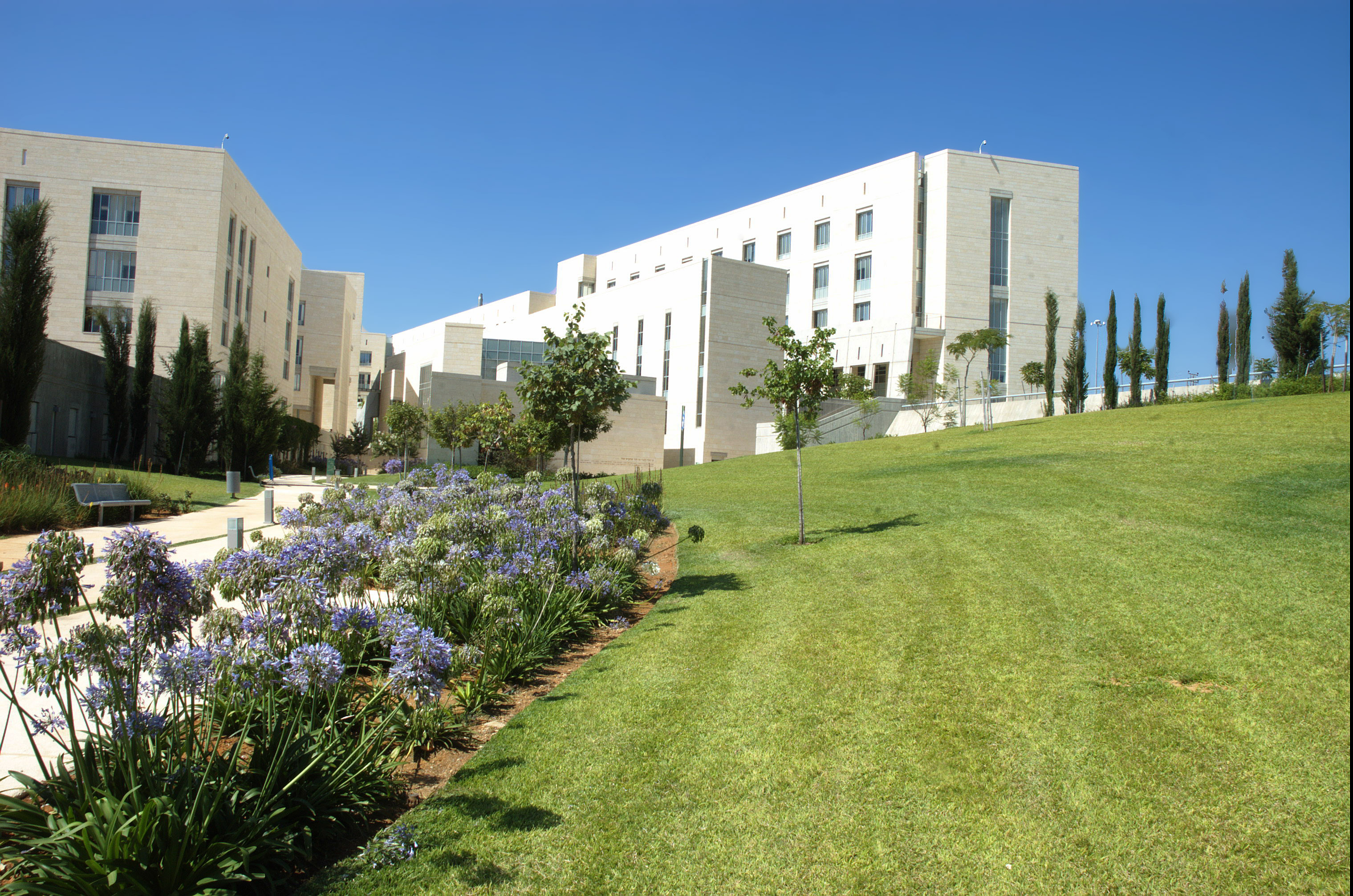 קמפוס האוניברסיטה הפתוחה ע"ש דורותי דה רוטשילד ברעננה